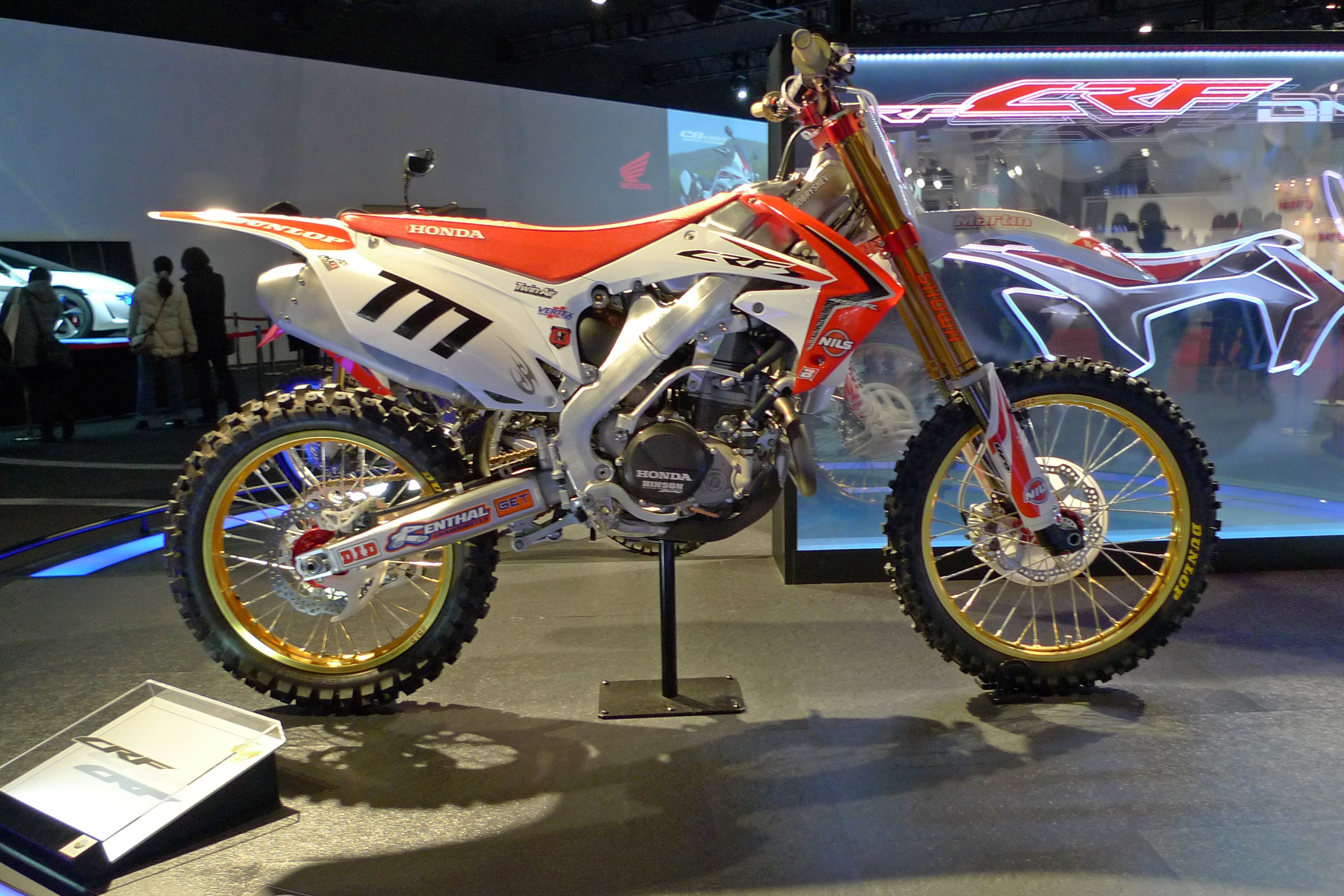 ホンダ・CRF250L 2012 東京モーターショーにて撮影